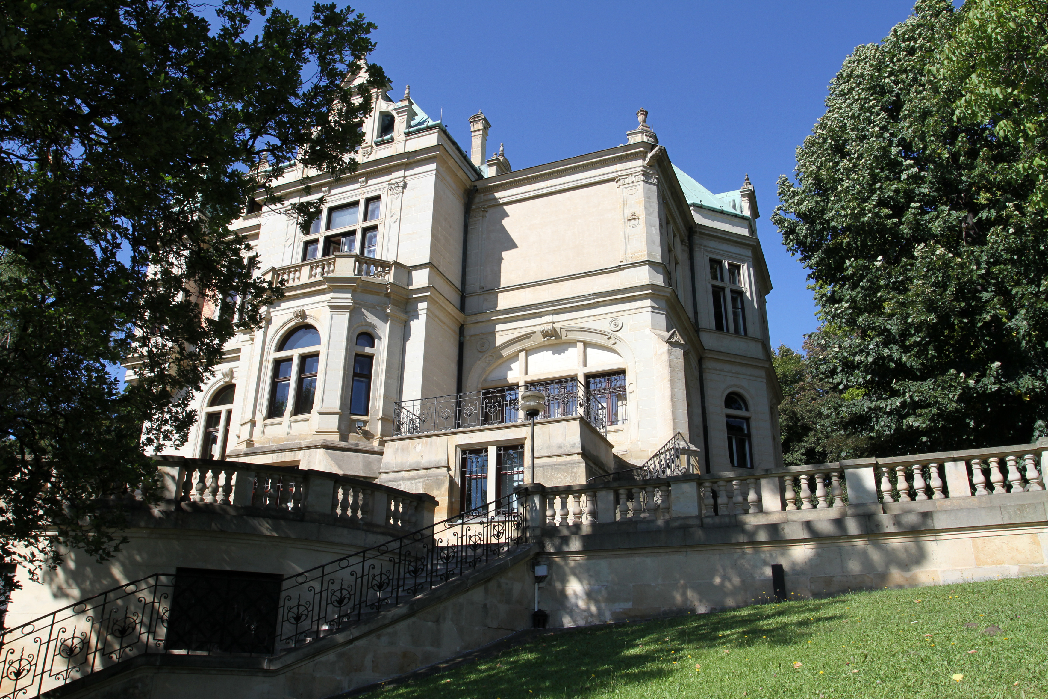 Wolfrumova vila (Ústí nad Labem), Na schodech 1601/10, Ústí nad Labem